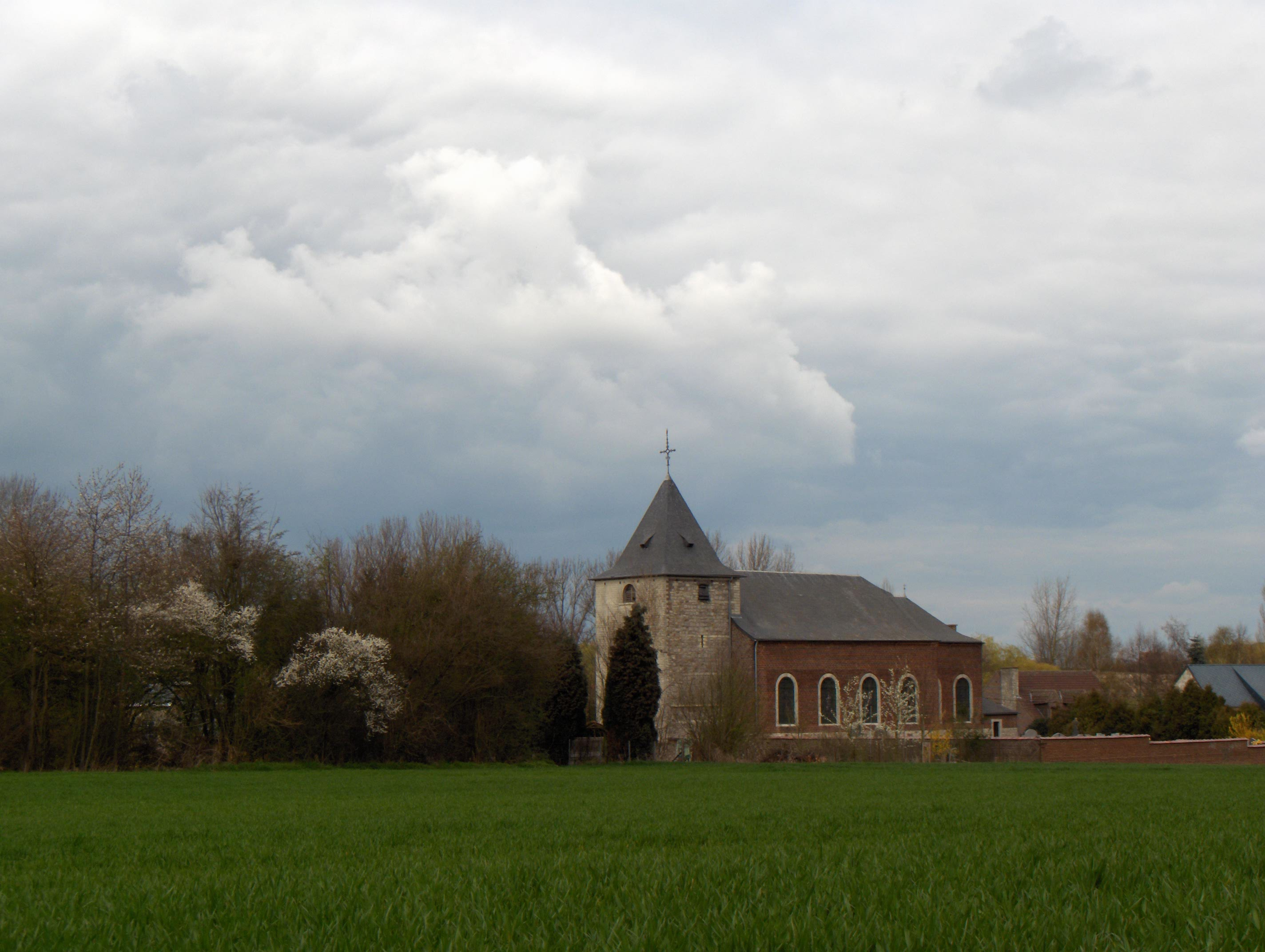 Geest-Gérompont, Ortsteil der Gemeinde Ramillies (Prov. Brabant Wallon, Belgien), Remigiuskirche (église Saint-Remy)